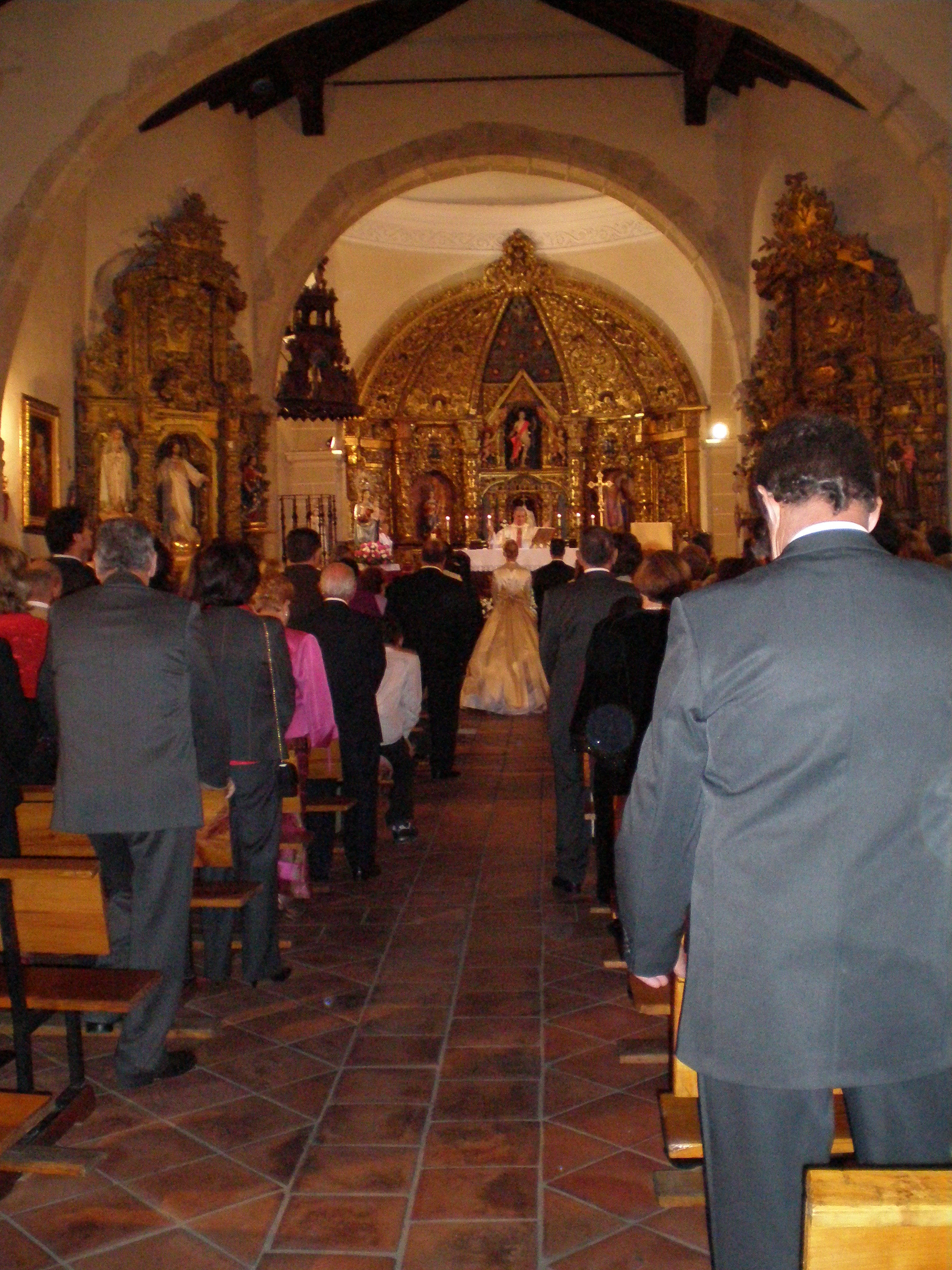 Boda en la iglesia parroquial de Barrado